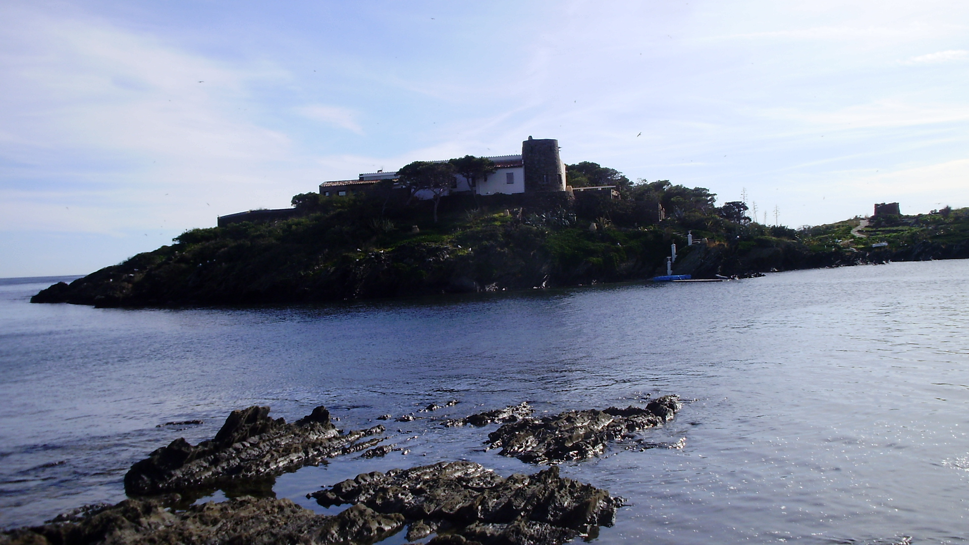 Illa de S'Arenella. Camí de Cala Calais. Cadaqués.